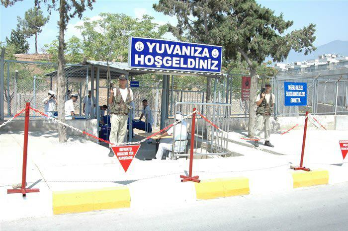 İskenderun Deniz Er Egitim Alay Komutanlığı